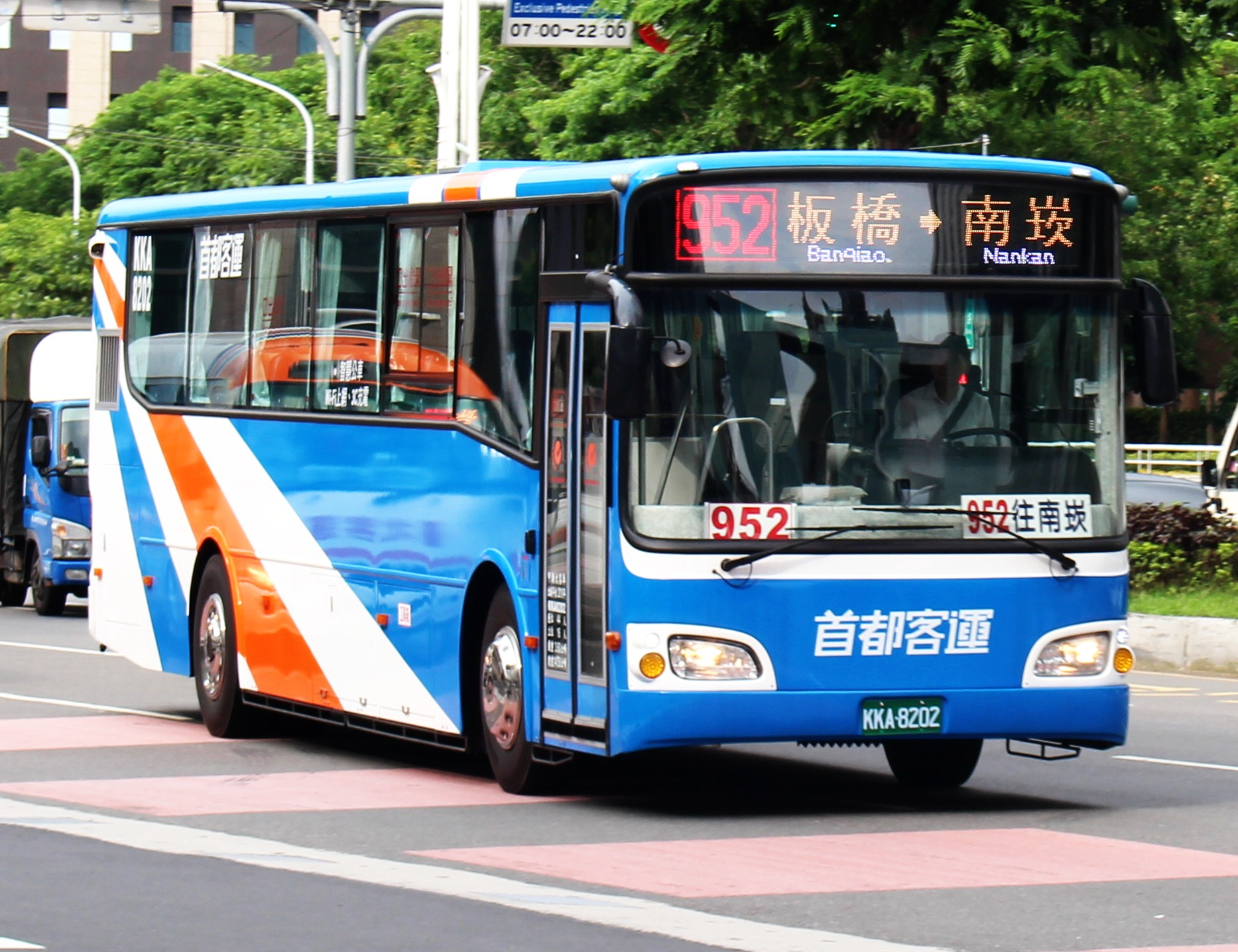 File:首都客運 HINO RK8JRVA KKA-8202 車門側